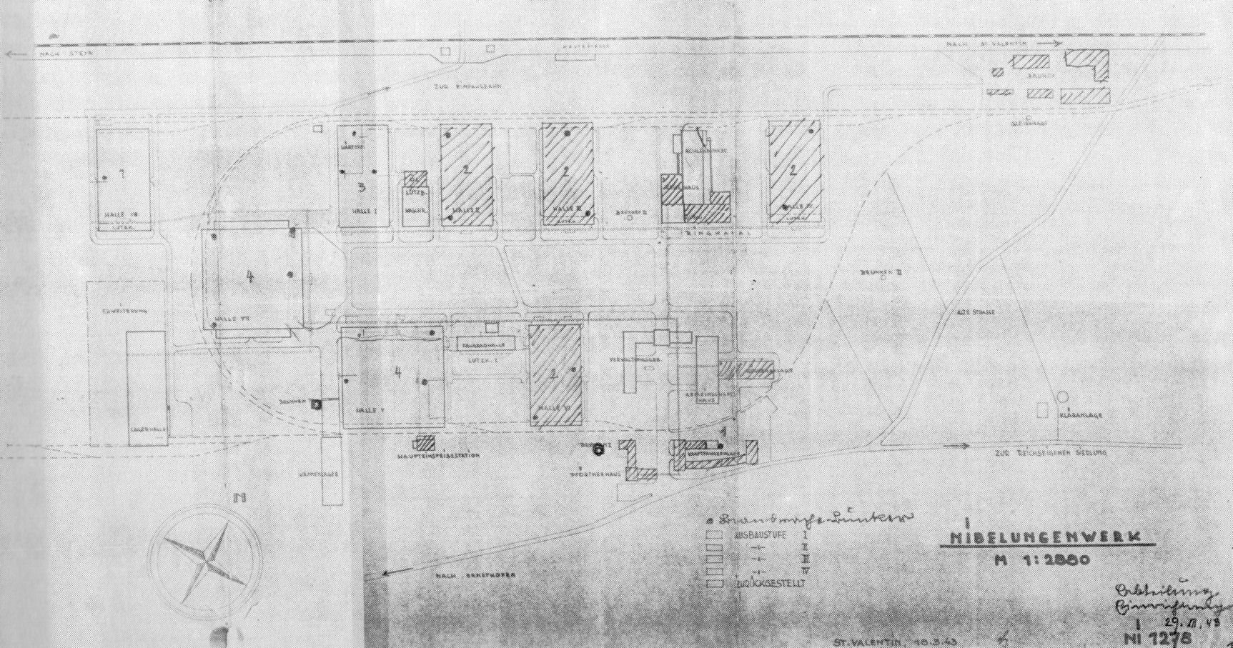 Plan des ausgebauten Nibelungenwerkes, welches das größte Panzer-Montagewerk der Achsenmächte im Zweiten Weltkrieg war